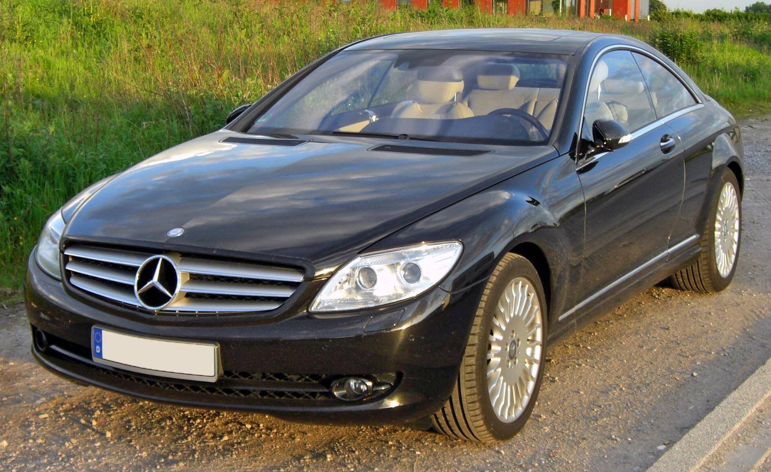 Mercedes CL 500